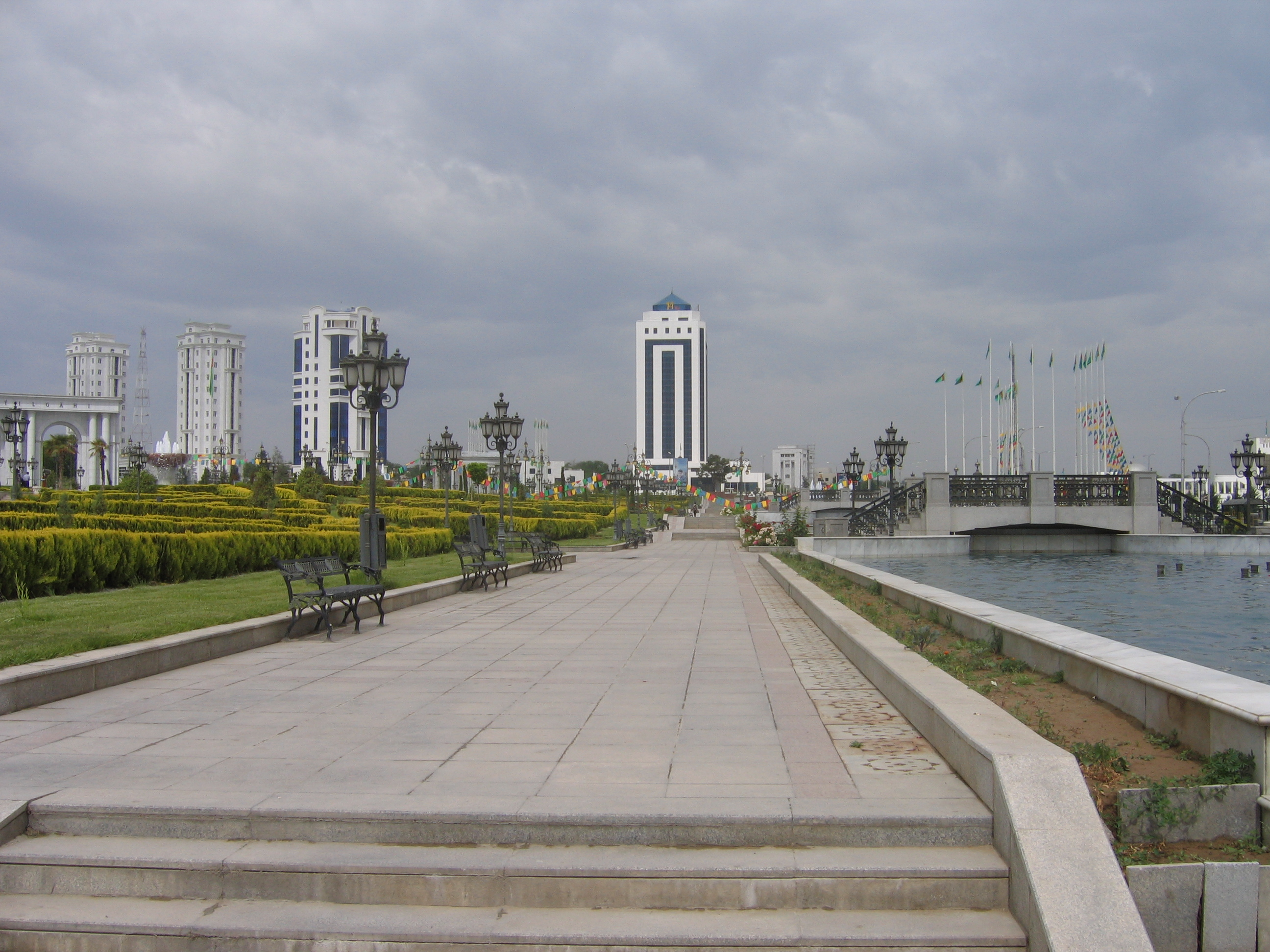 Ashgabat city park